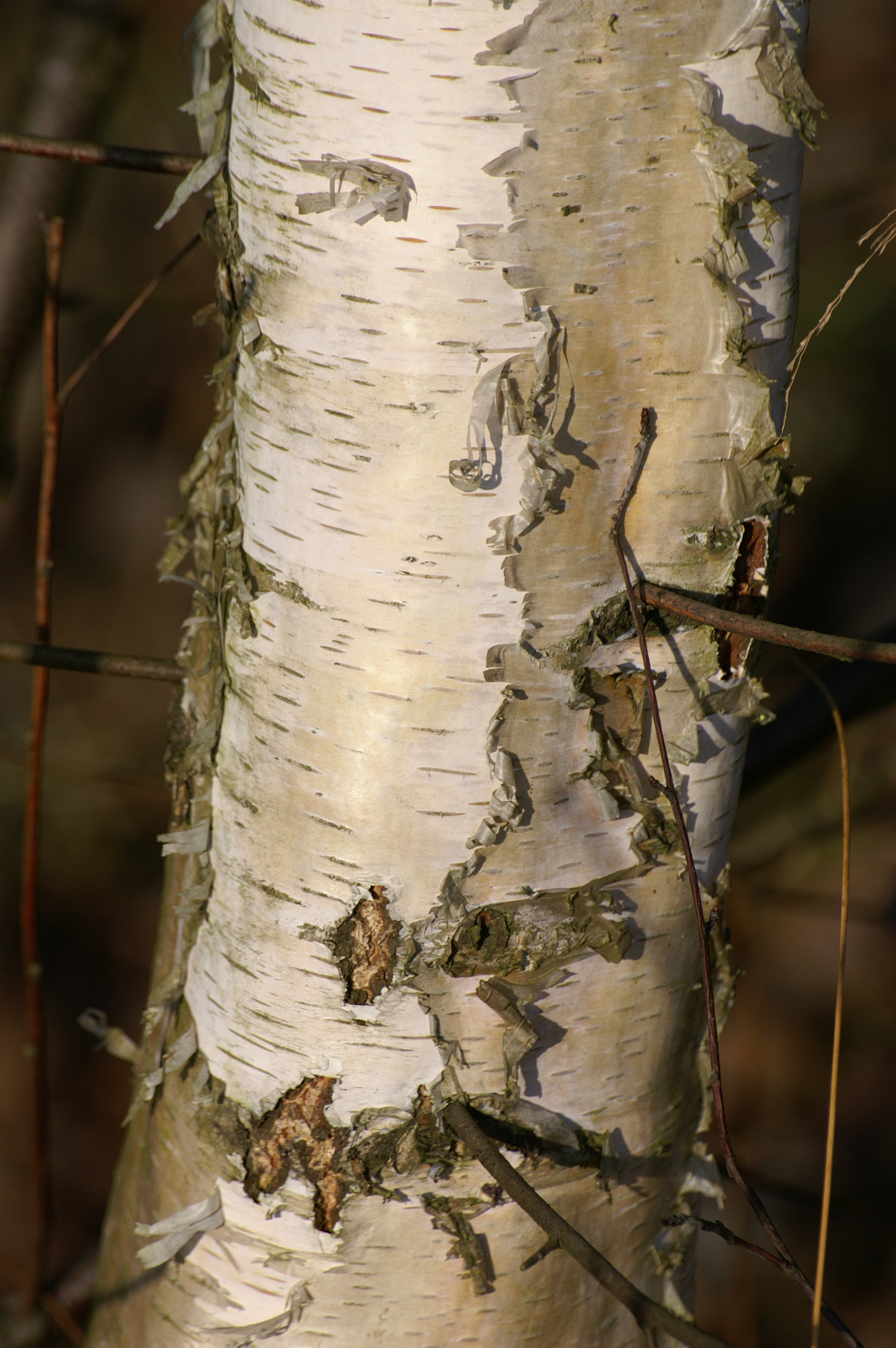 Bildgegenstand: Stamm und Rinde einer Sandbirke (Betula pendula)